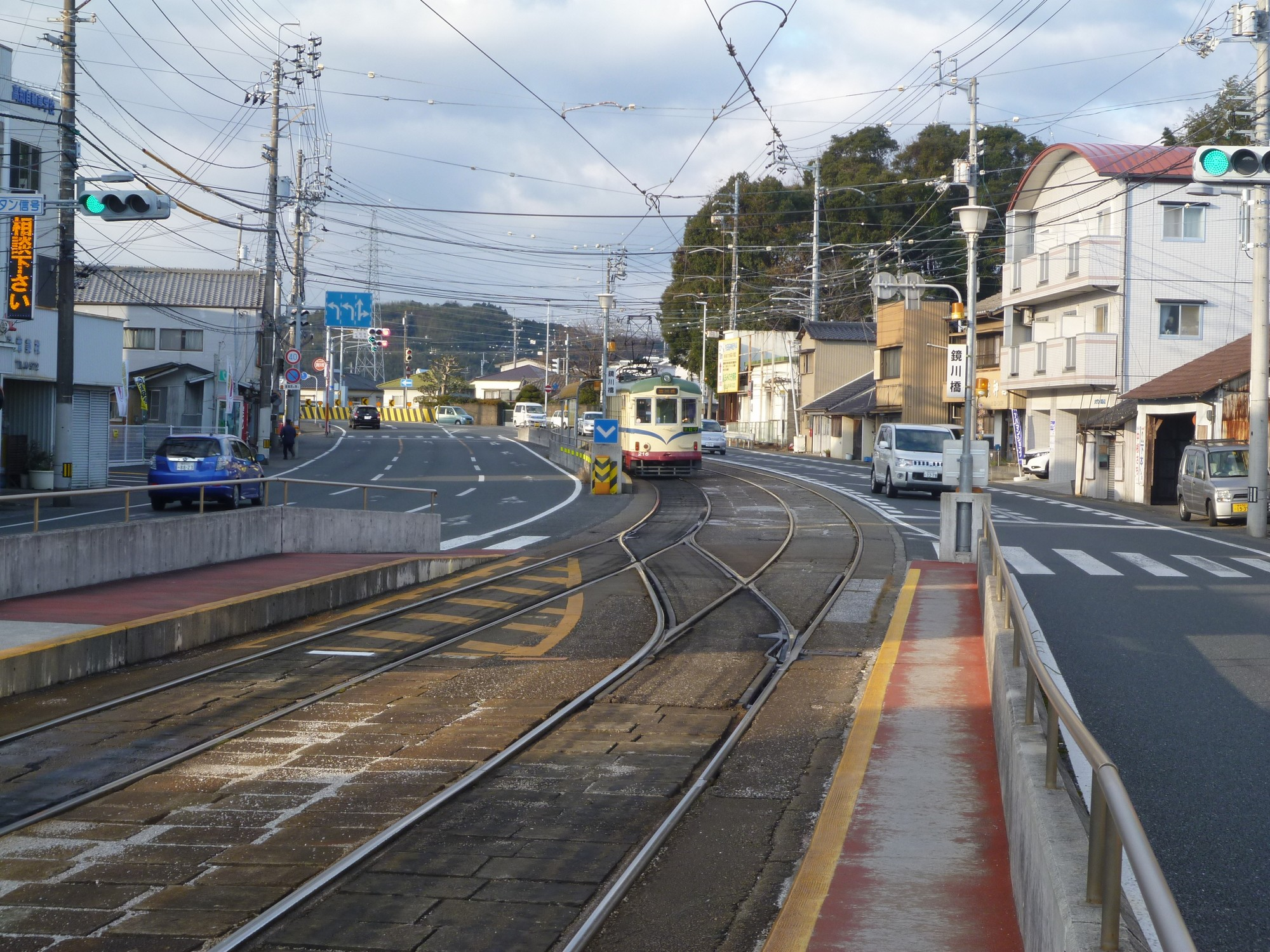 2015年1月2日撮影。